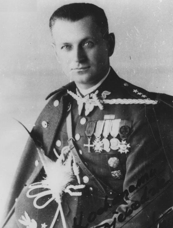 Józef Sławomir Hartman